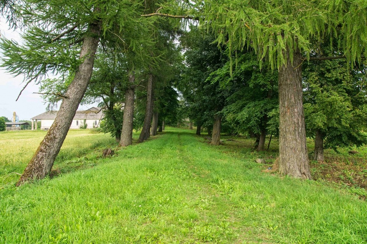 Псуя. Былая сядзіба. Алея